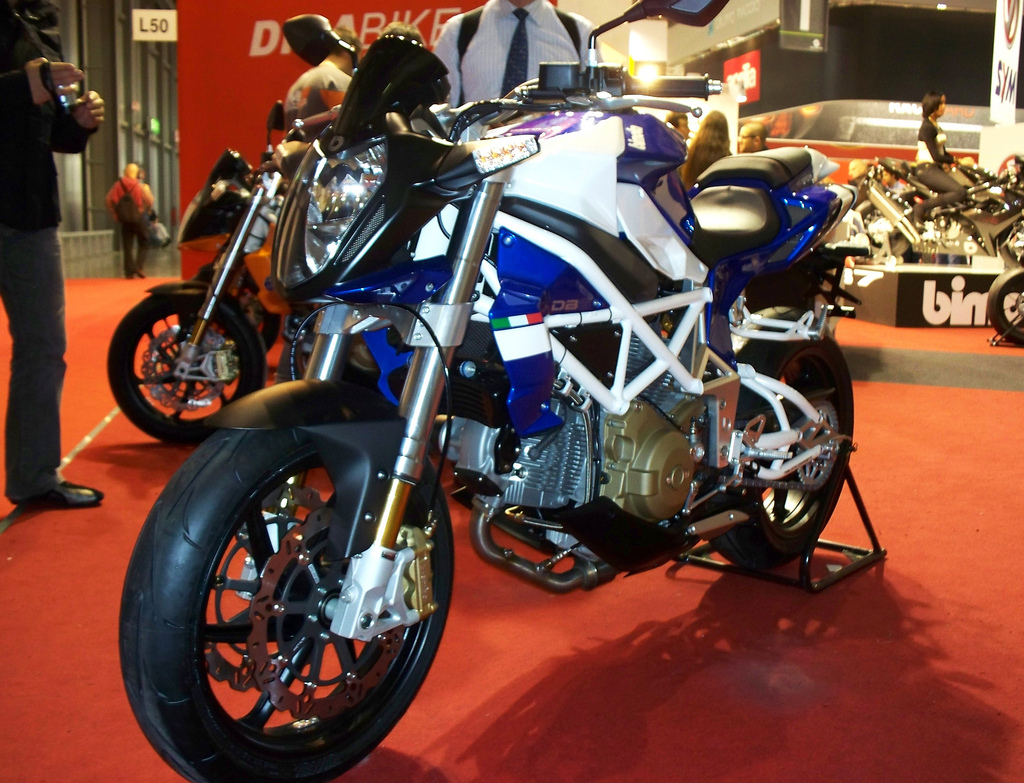 Blue Bimota DB6 Delirio